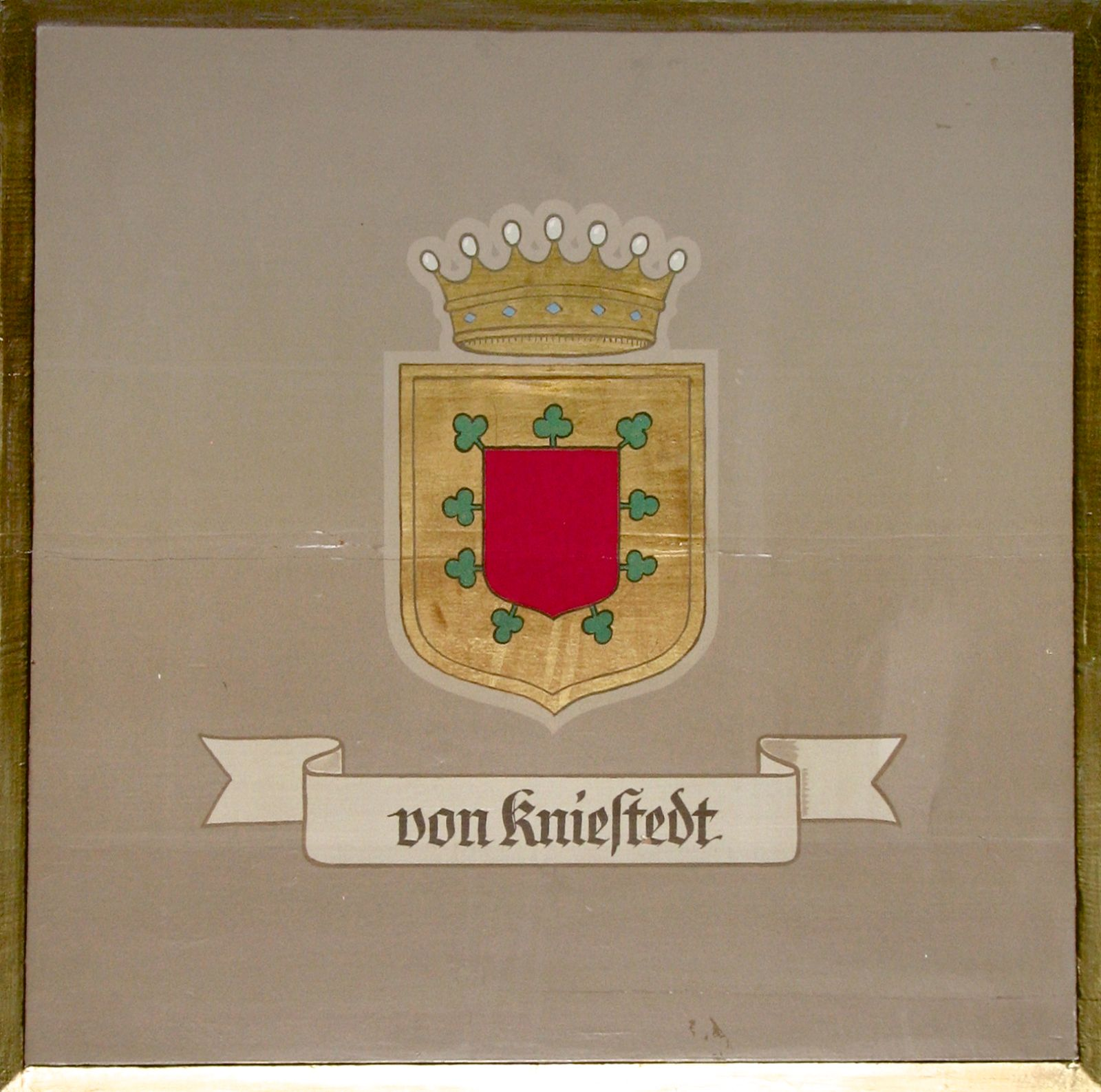 Darstellung des Wappens der Familie von Kniestedt aus der Kniestedter Kirche in Salzgitter-Bad.